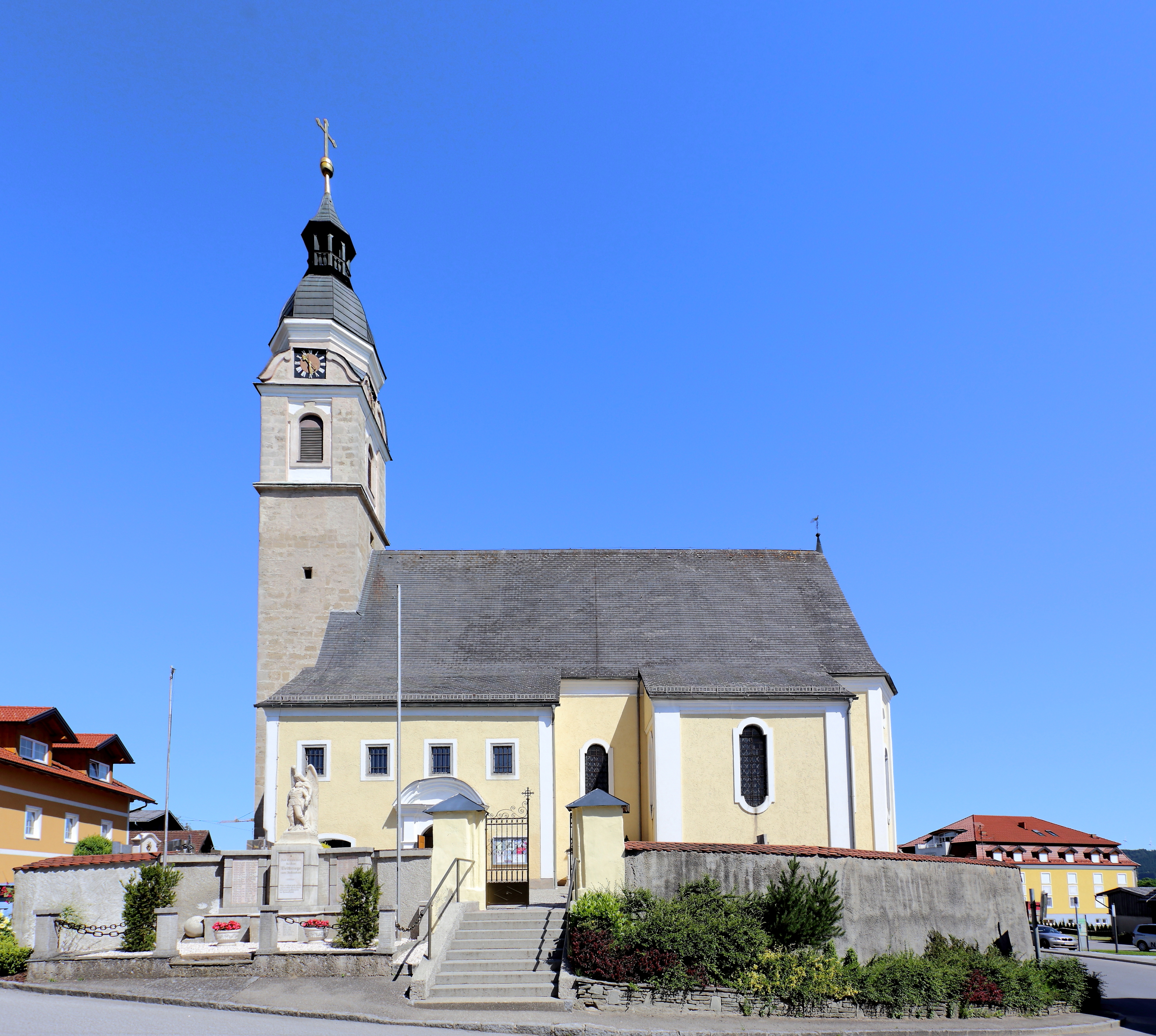 Südostansicht der katholischen Pfarrkirche hl. Jakob der Ältere in der oberösterreichischen Gemeinde Lengau. Eine im Kern gotische Kirche, die Mitte des 17. Jahrhunderts brockisiert wurde.